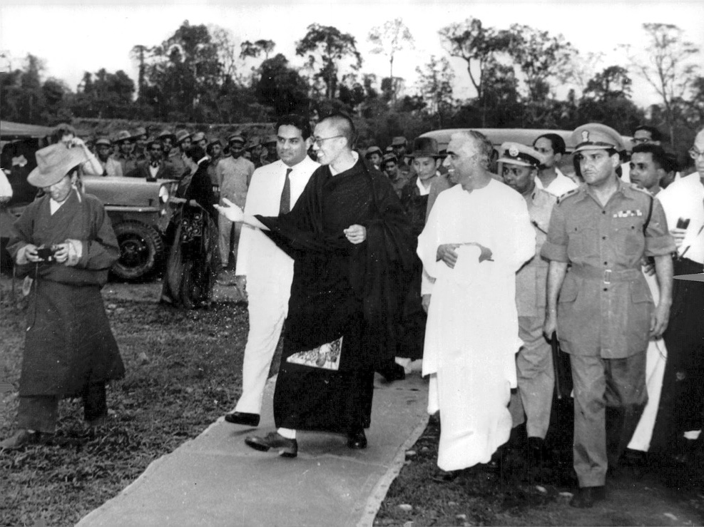 Dalai Lama i Indien med P.N. Menon, 1959.